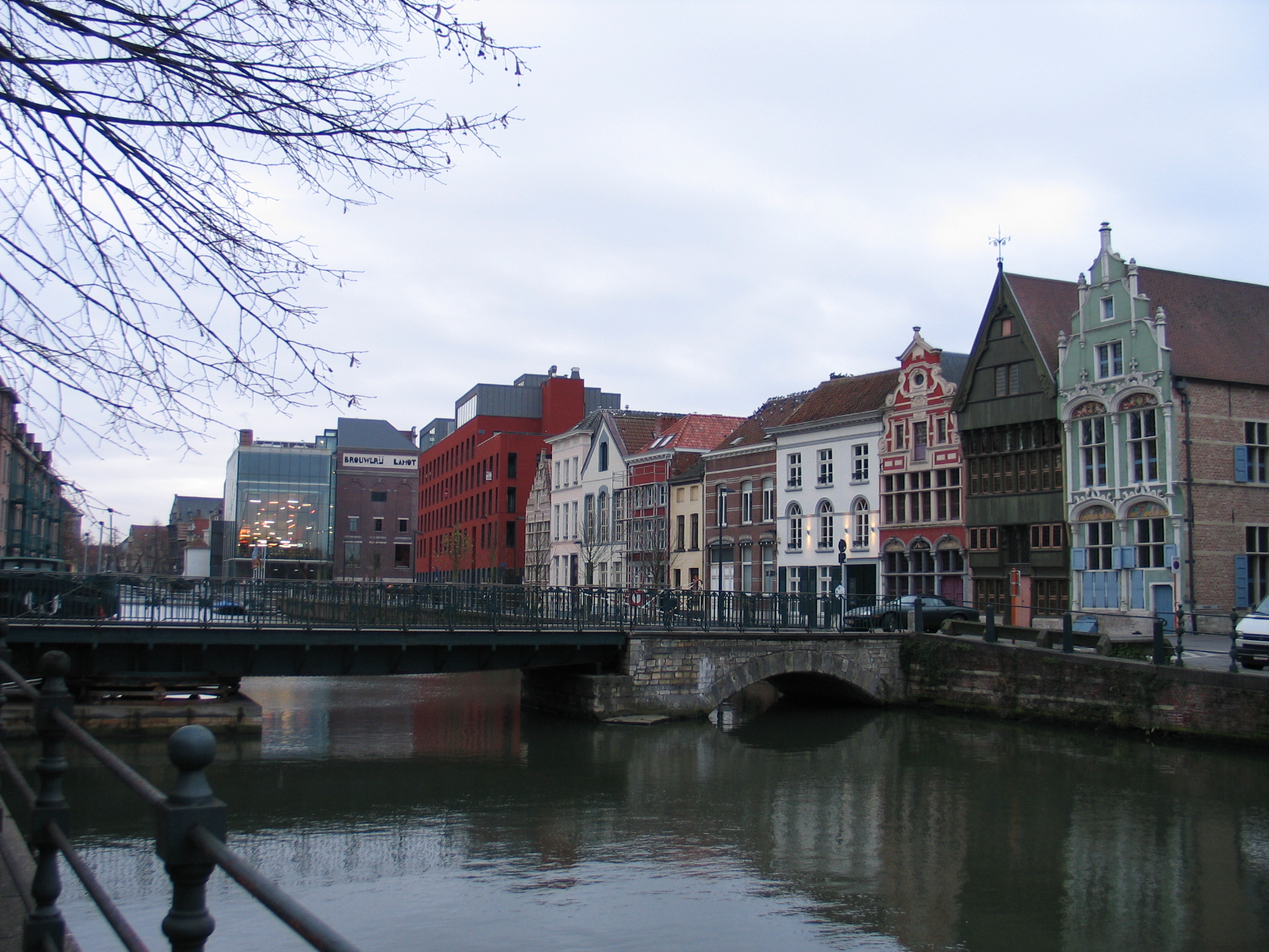 De Dijle te Mechelen - eigen foto